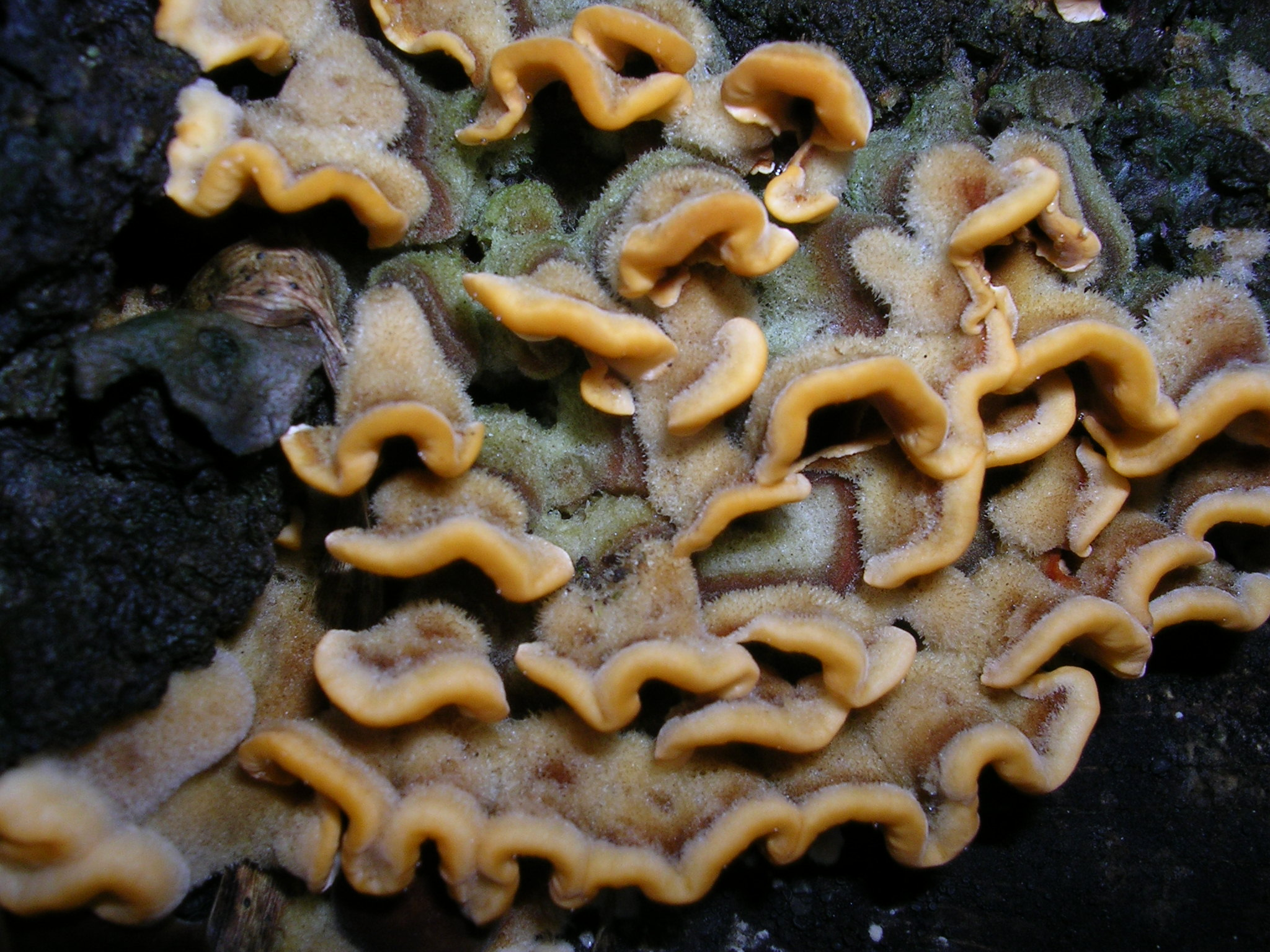 Owocnik Stereum hirsutum.